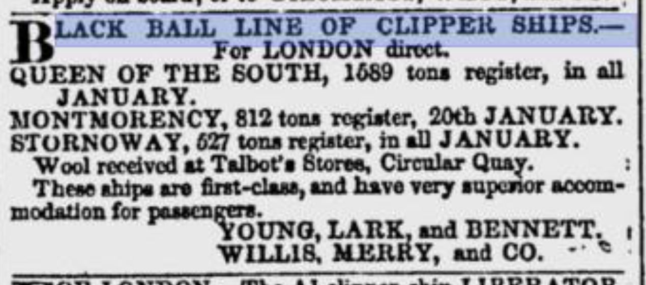 Extrait agrandi du journal Sydney Morning Herald du 17 janvier 1865. Indication du prochain départ pour Londres du clipper Queen of the South